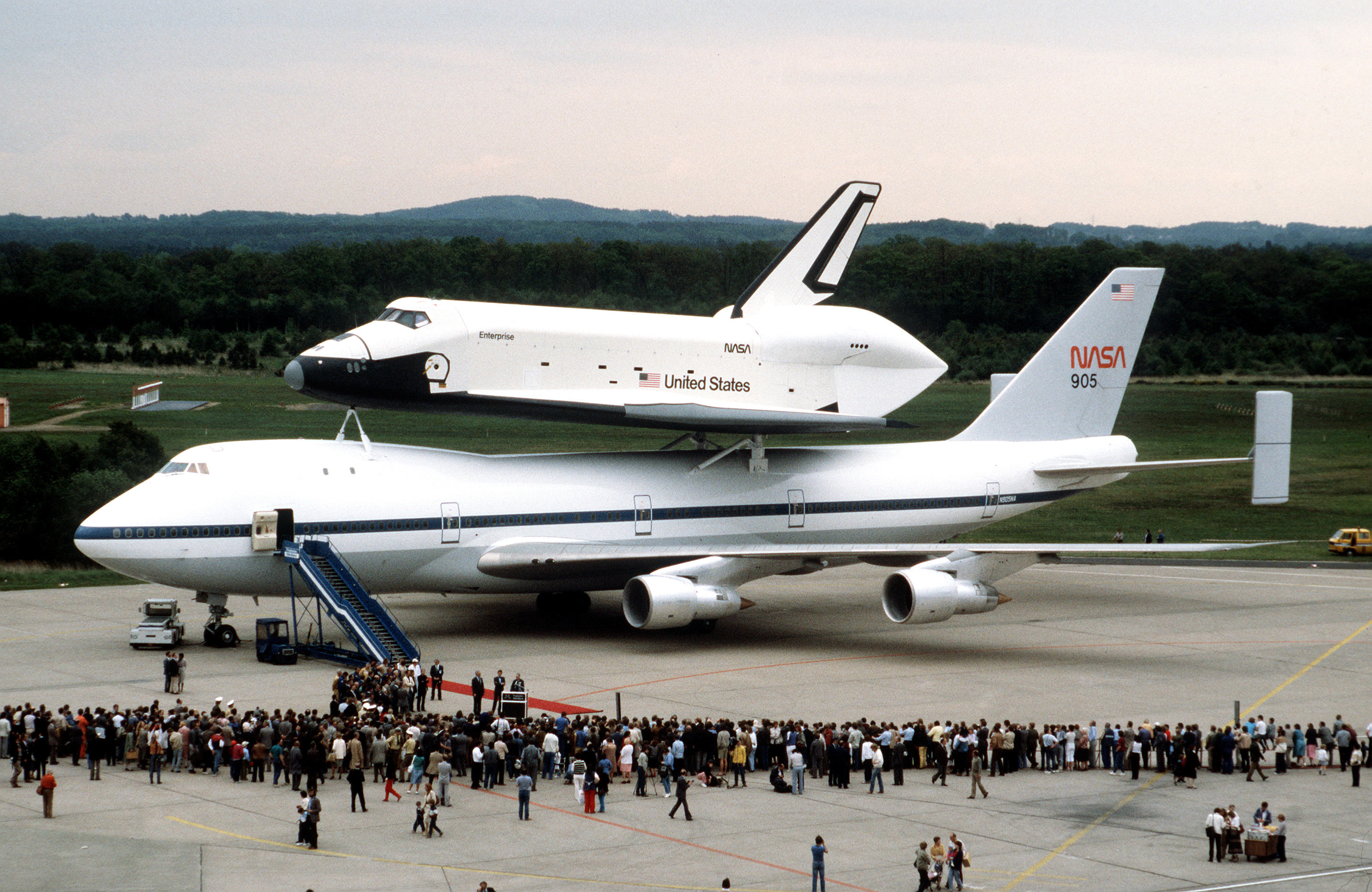 VSpectators observe the arrival of the Space Shuttle Enterprise and its modified 747 transport aircraft at the Koln-Bonn Airport